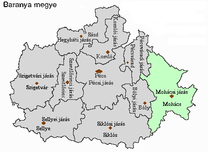 Magyarország, Baranya megye, Mohácsi járás